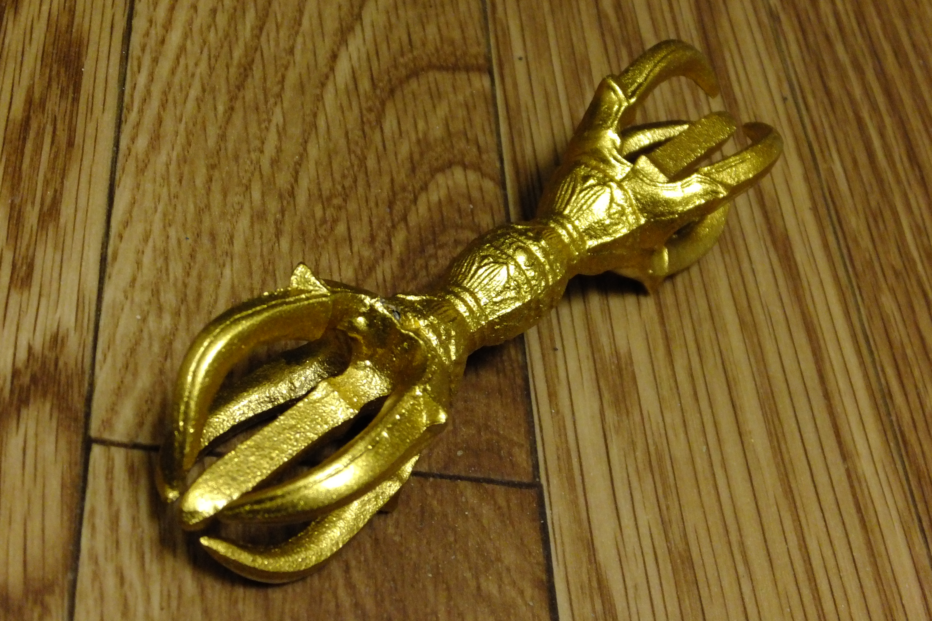 金剛杵のひとつ、五鈷杵（レプリカ）。亜利紗（旧名おたふくえりす）個人所蔵。不動明王通信講座の教材にこの五鈷杵が付属。